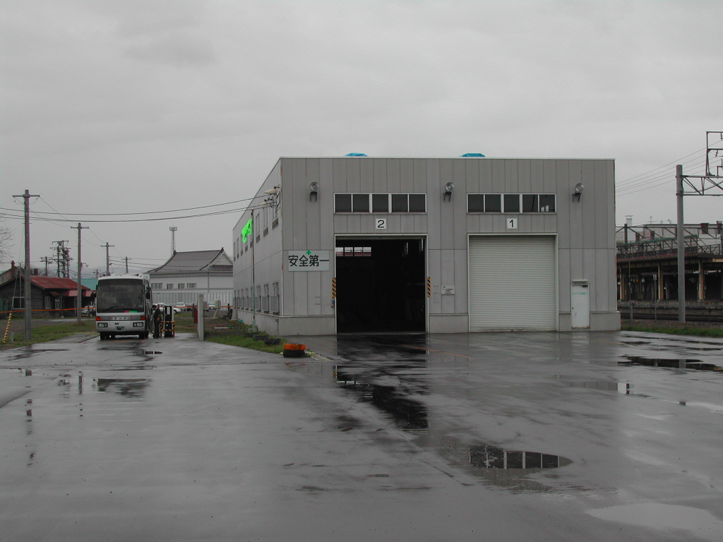 深川営業所遠景